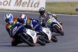 Angel Nieto Jr. in 1998 riding Aprilia